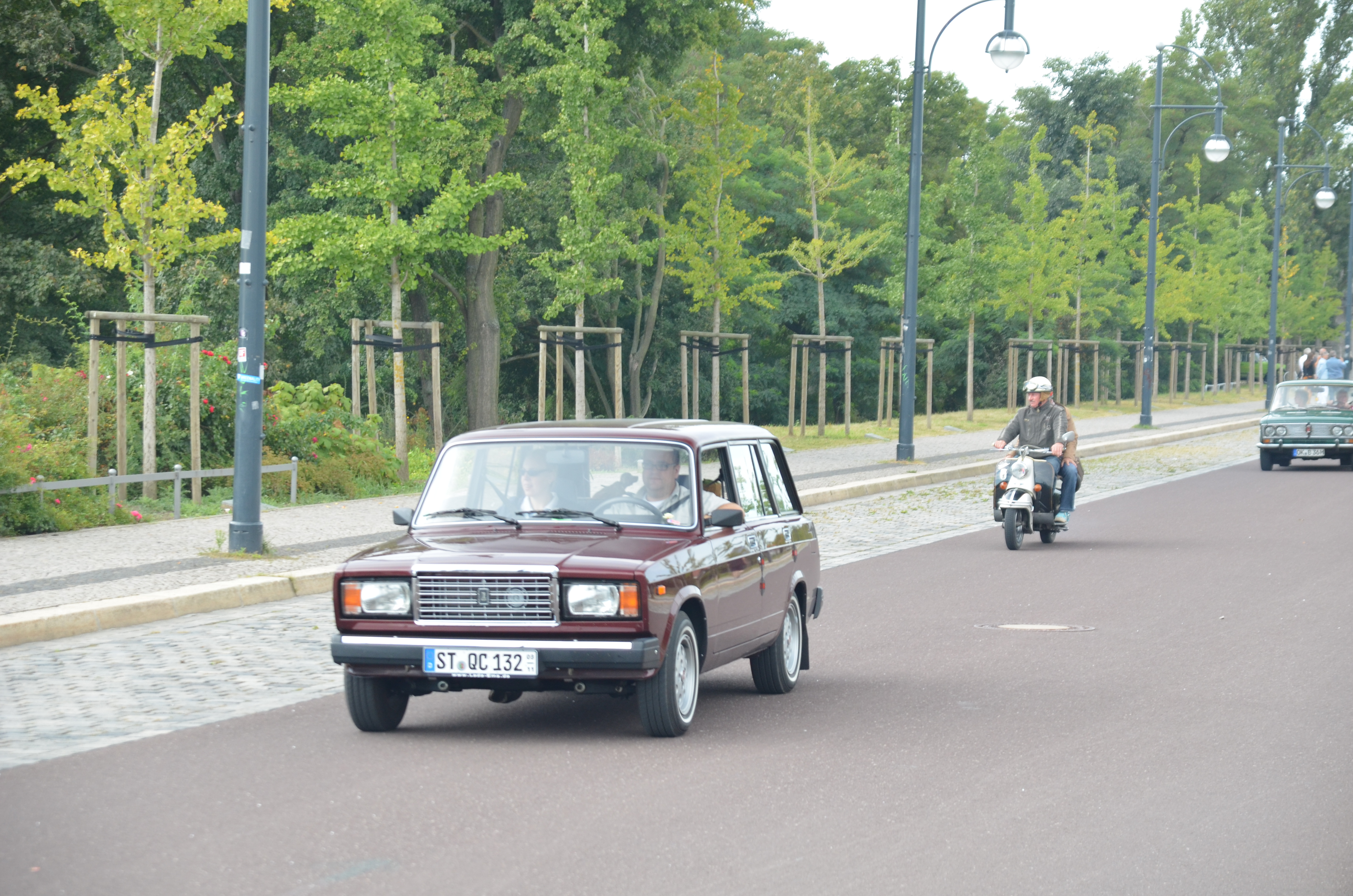 OMMMA Ausfahrt am 02.09.2012 vor der Sternbrücke - VAZ-21047